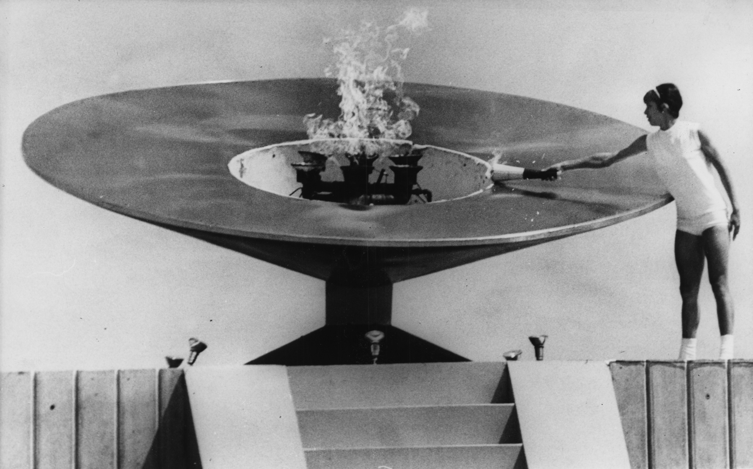 Enriqueta Basilio fue la primera mujer en toda la historia olímpica en llevar la antorcha y encender el pebetero el 12 de octubre de 1968 en la ceremonia inaugural.